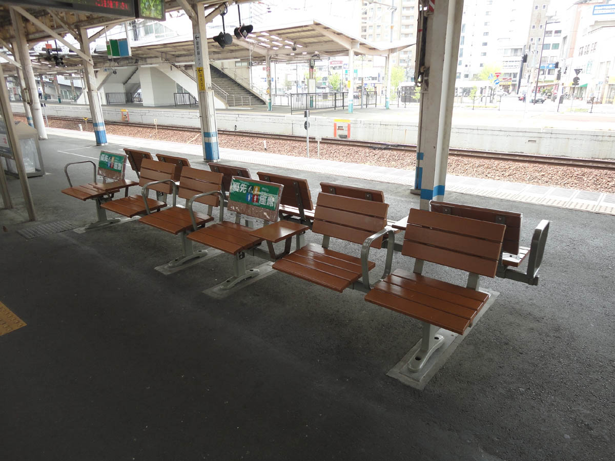 岡山支社菅内に設置されているホームベンチの優先座席